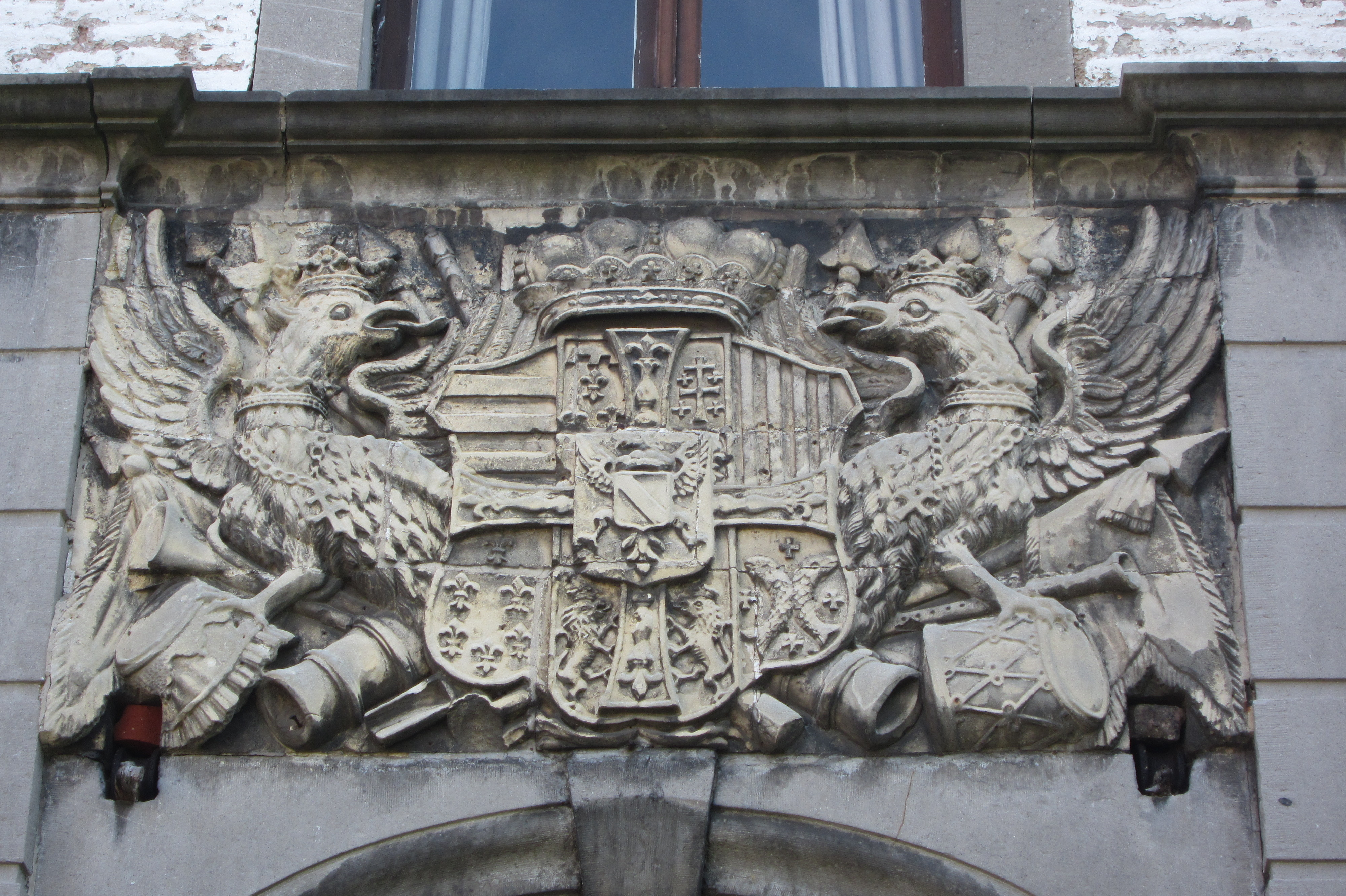 Wapenschild Karel Alexander van Lotharingen